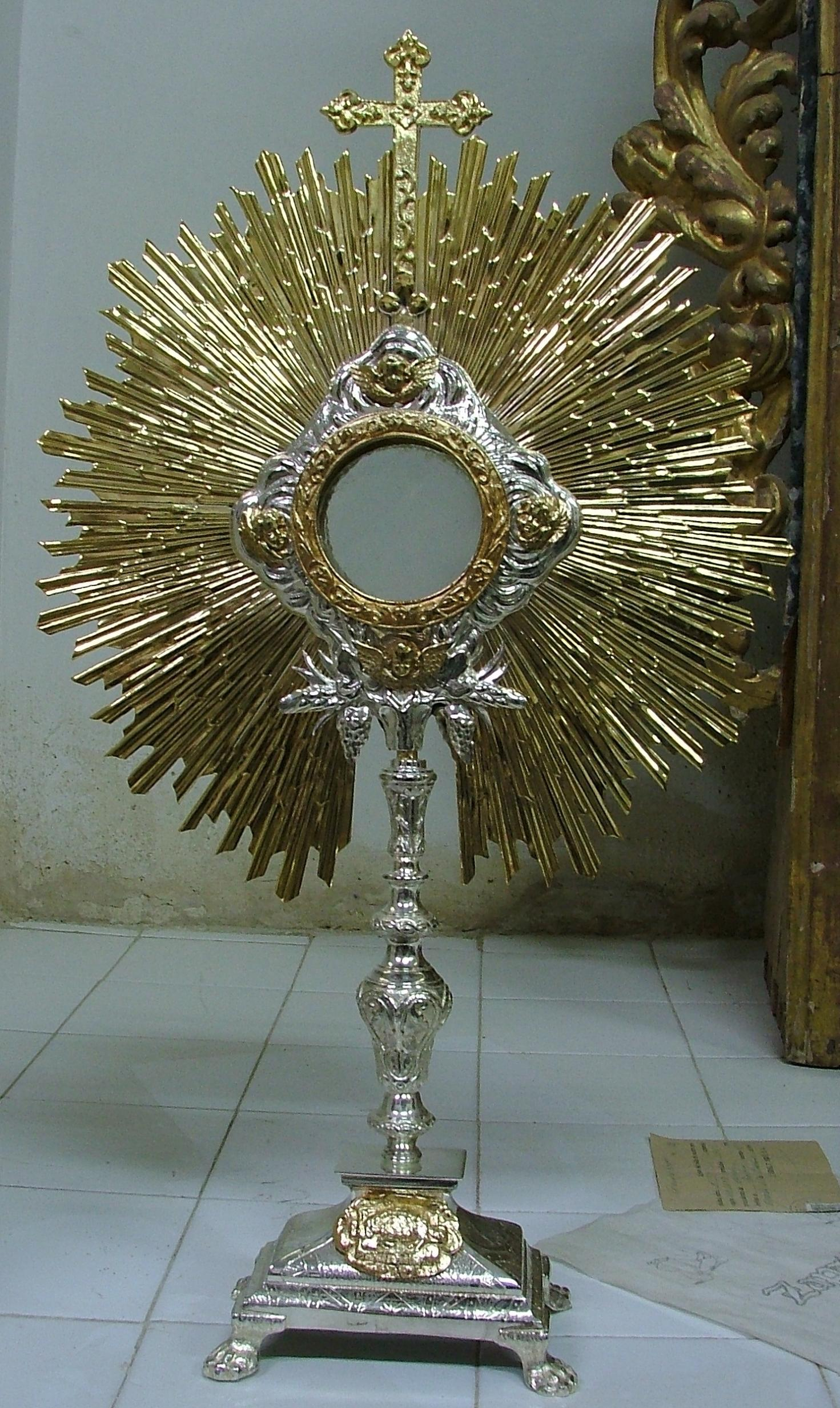 Custodia de mano Dado el peso y difícil manejo de la custodia grande (se procesionaba en peana ), se hizo para procesionarla, una persona, el día del Corpus y para usar dentro del templo parroquial.